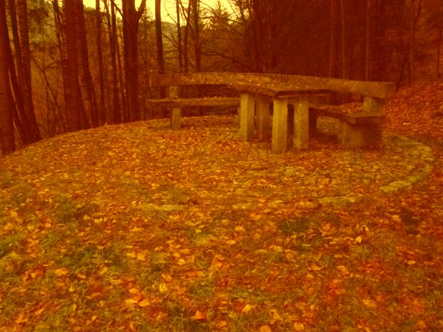 St._Pankratiuskapelle-Rastplatz-neu